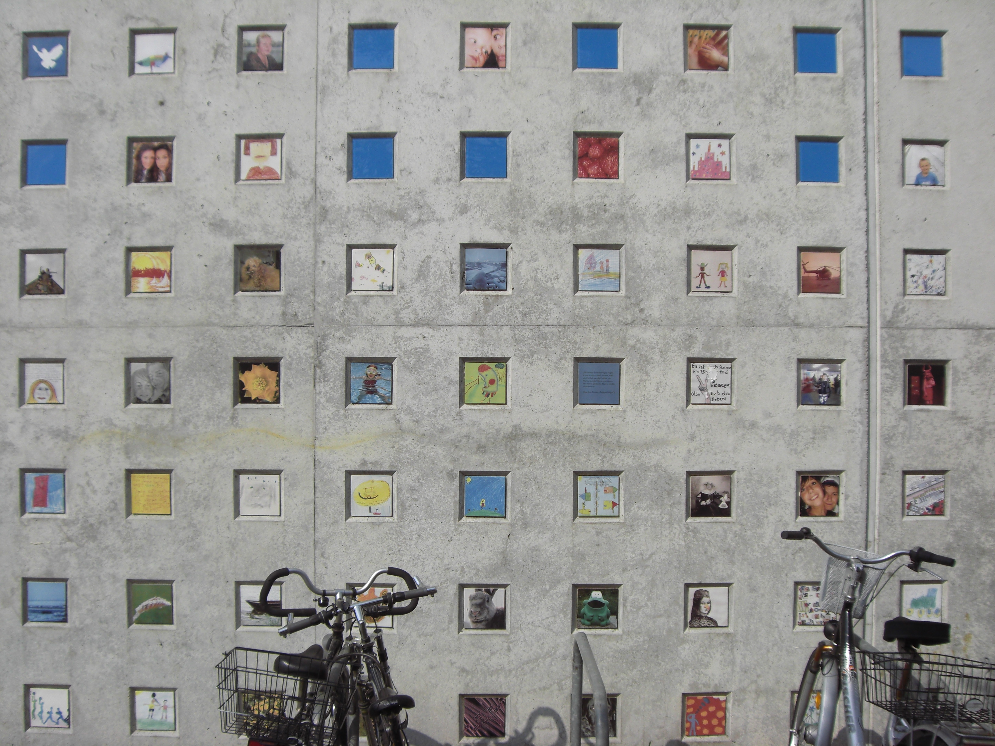 Fassadendetail an der Station Allermöhe der Hamburger S-Bahn.